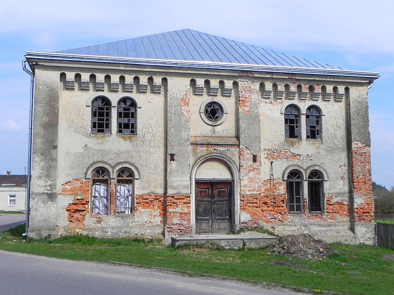 Synagoga w Wielkich Oczach.